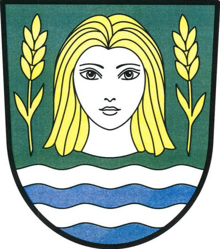 Litošice, znak obce